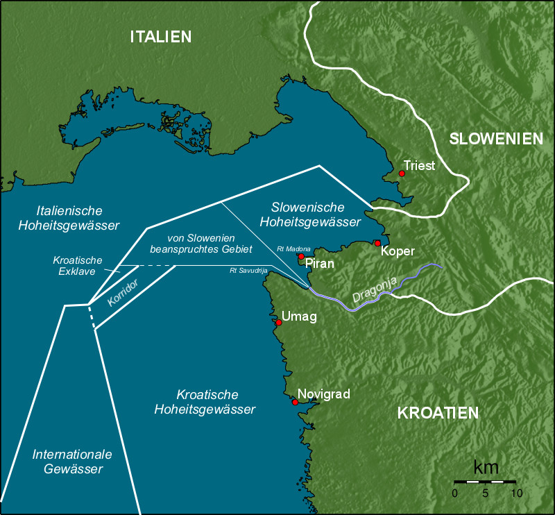 Grenzstreit in der Bucht von Piran